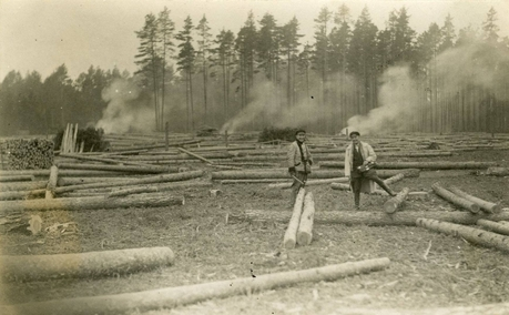 1920ndate metsaraie Eesti Vabariigis